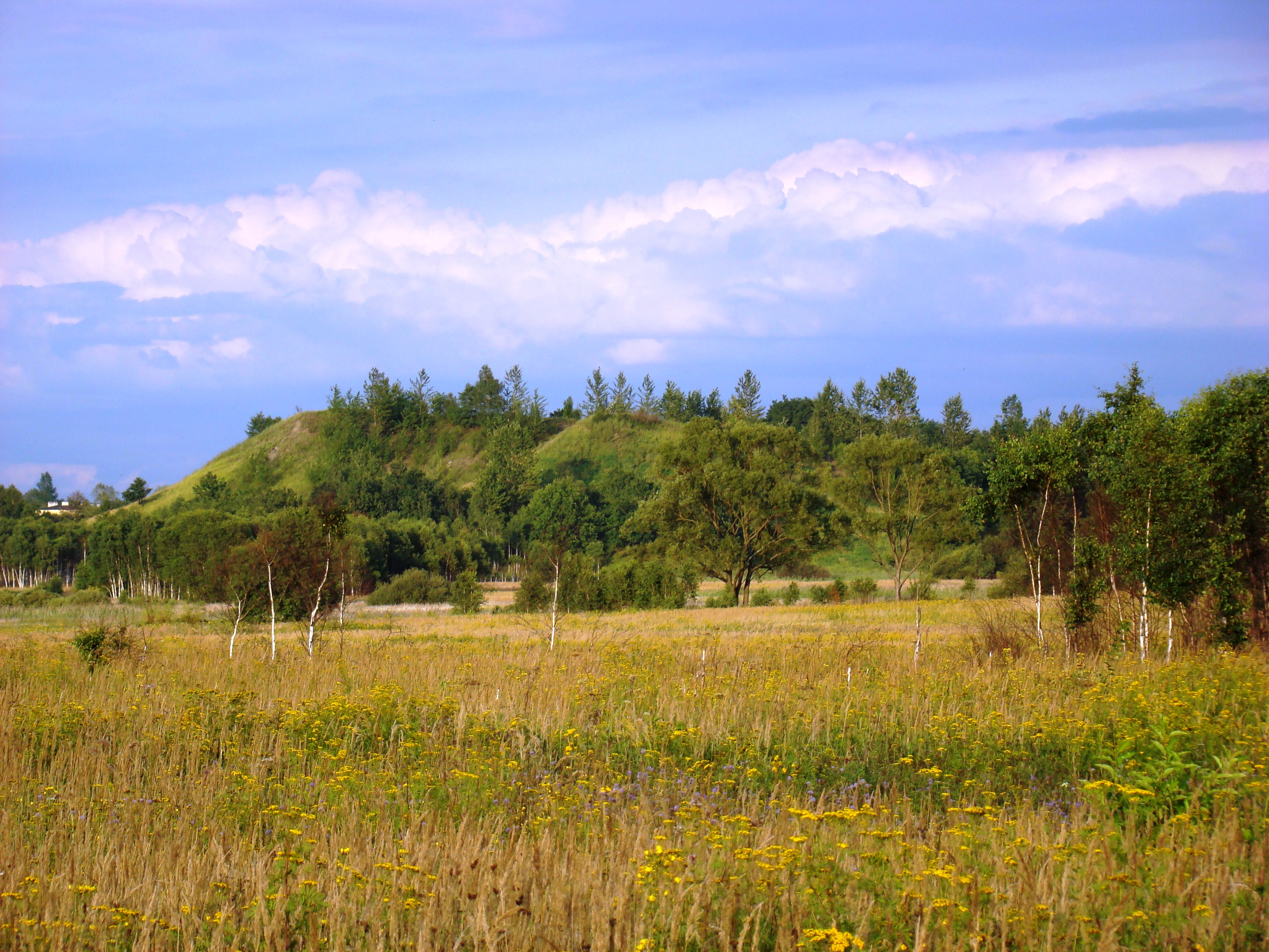 Hałda kopalni rud żelaza "Paweł" w Liszce Dolnej, szyb V